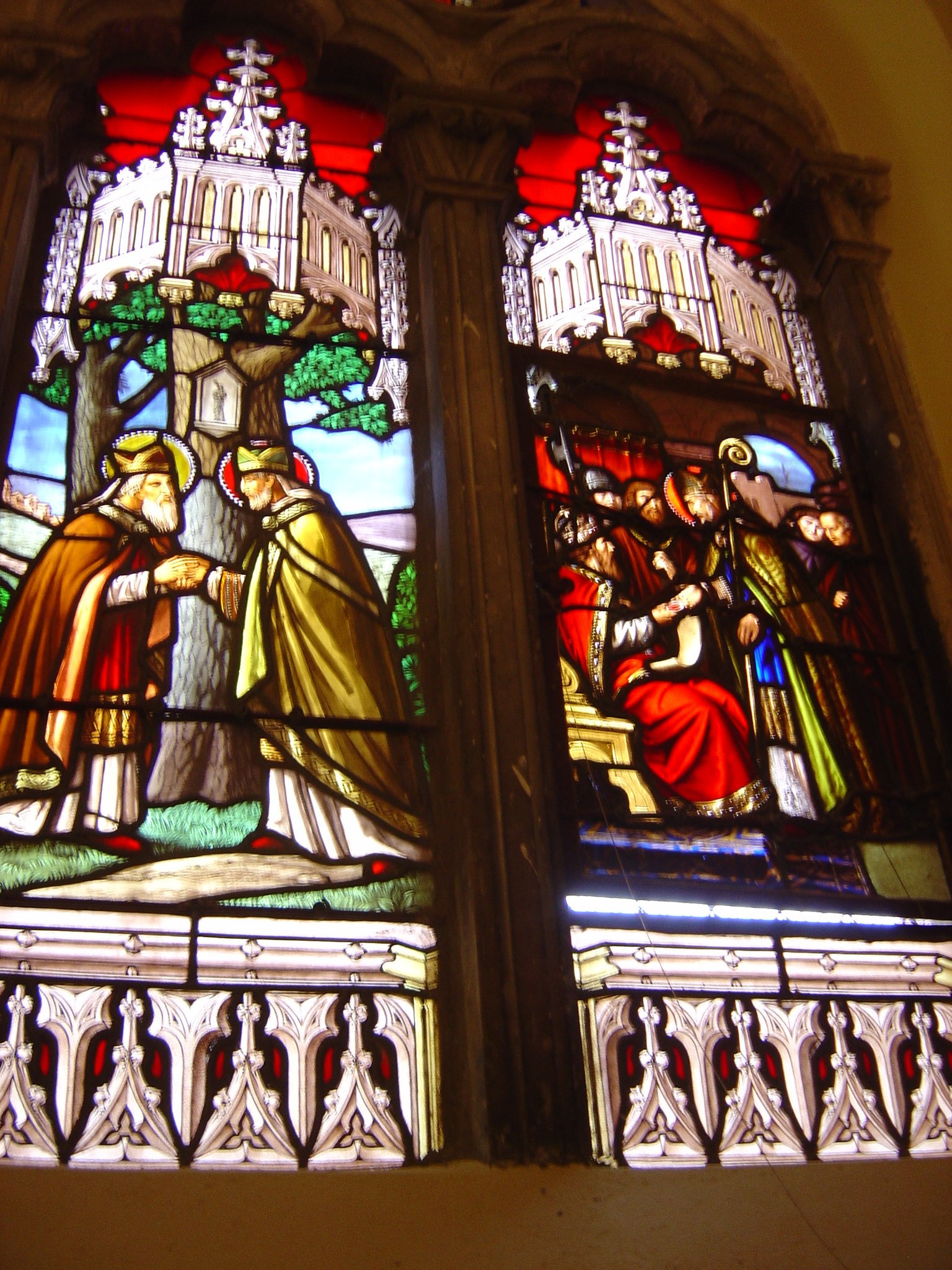 Vitraux néogothiques de la chapelle du Petit-Saint-Dié, seconde moitié du XIXe siècle (Marchal, Nancy), endommagés en 1944 et restaurés en 1972-73 (Atelier 54, Nancy). Cycle de la légende de saint Dié (ou Déodat), 8 et 7 : 8. Rencontre de Déodat et Hydulphe à la croix de Béchamp. 7. Childéric II, roi d'Austrasie, donne le Val de Galilée à Déodat.